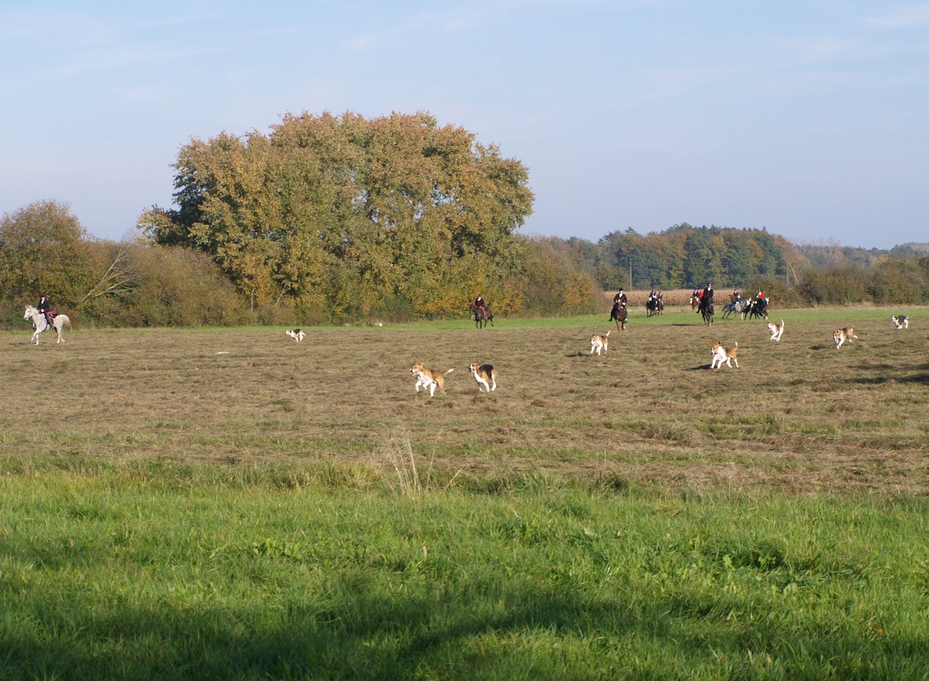 Meute auf der Spur von Pikeuren begleitet